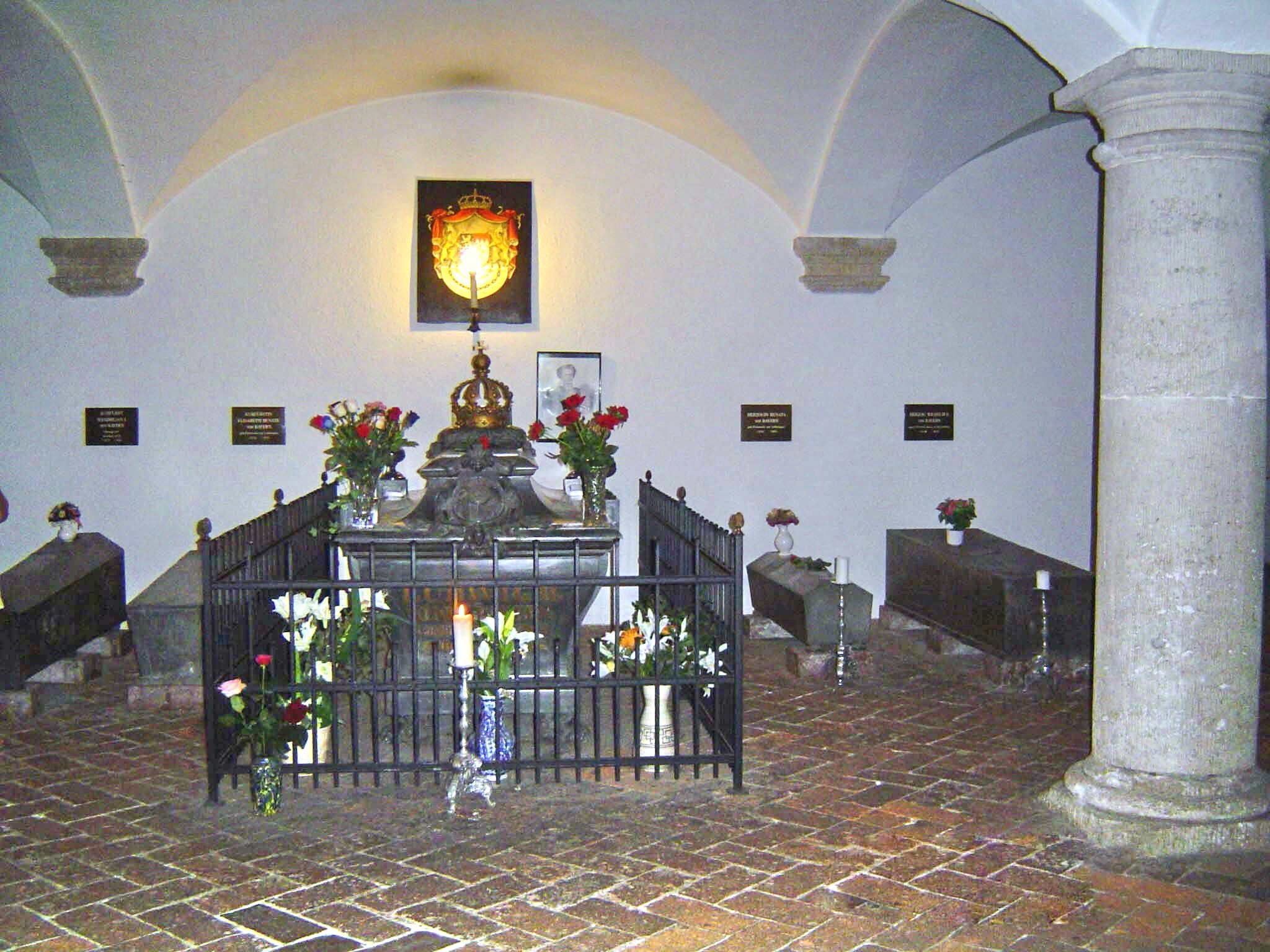 München, Michaelskirche, Sarkophag von Ludwig II.